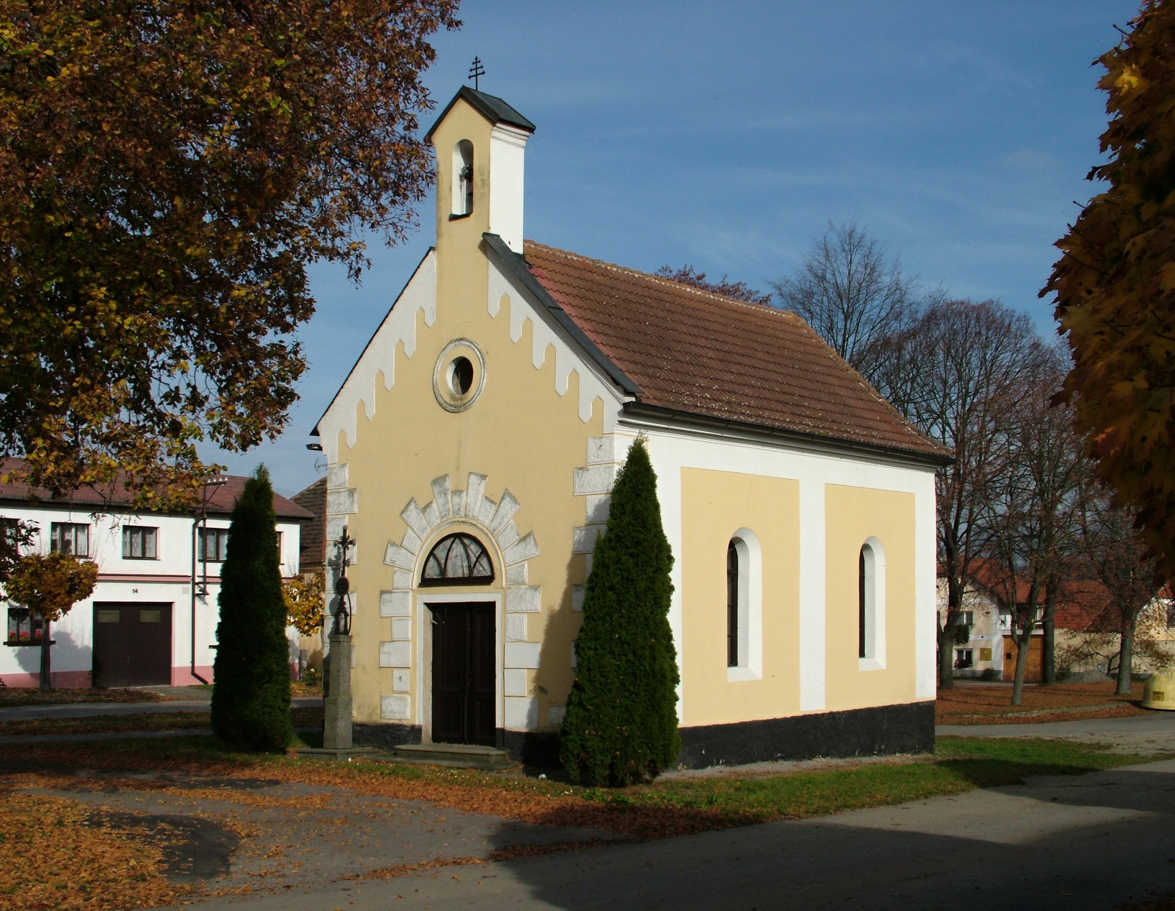 Návesní kaple Svojnice